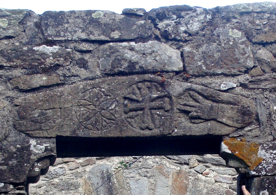 Le linteau de la porte de façade de la chapelle, sculpté de motifs symboliques : colombe, rosace, croix pattée, main bénissante. Ensemble repris par la commune de Prunelli-di-Fiumorbo comme blason.